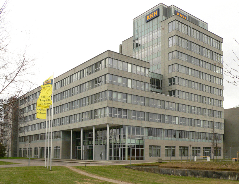 KKH in Hannover